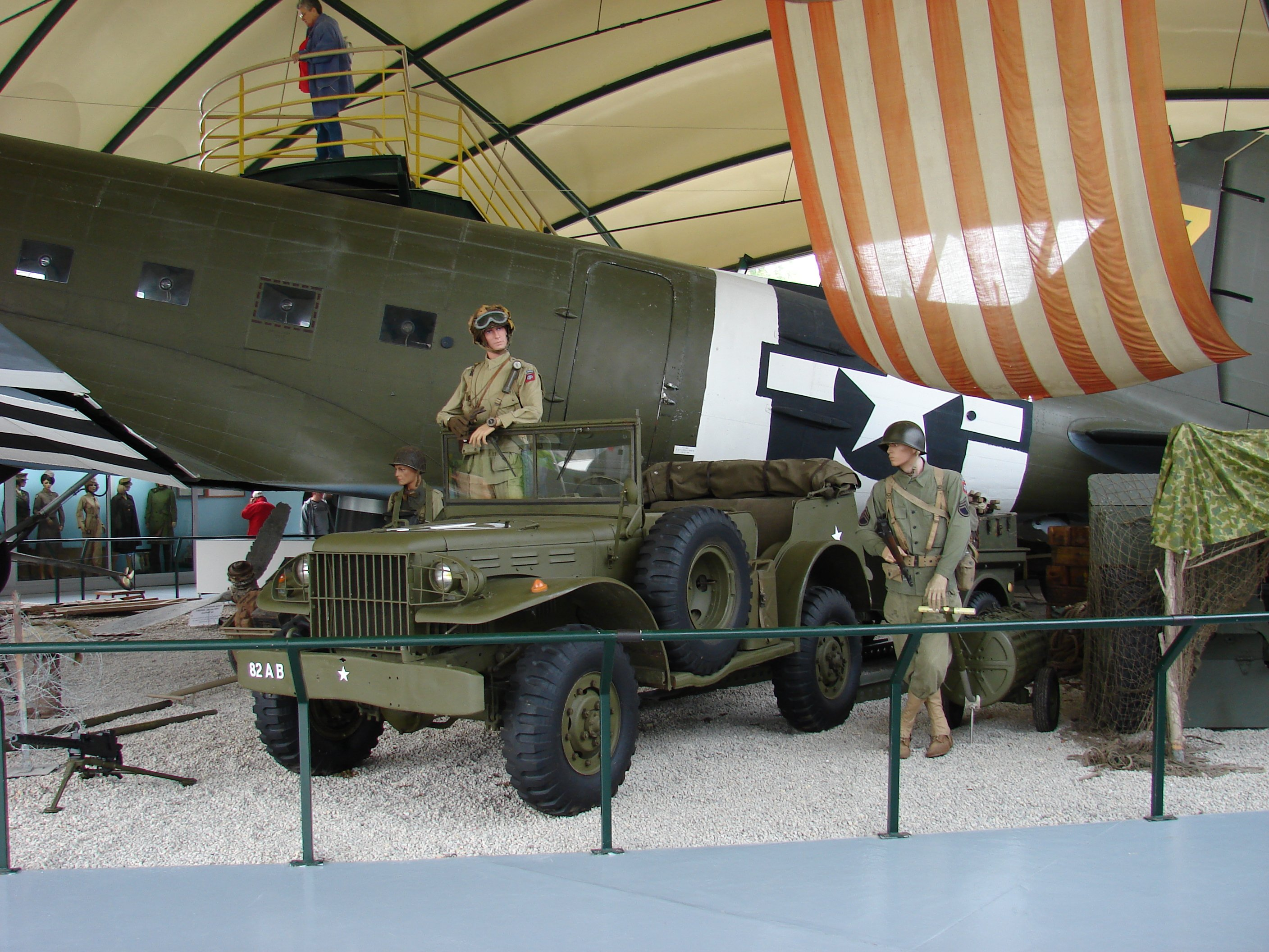 Imagem do interior do museu "Airborne" em Sainte Mère Eglise